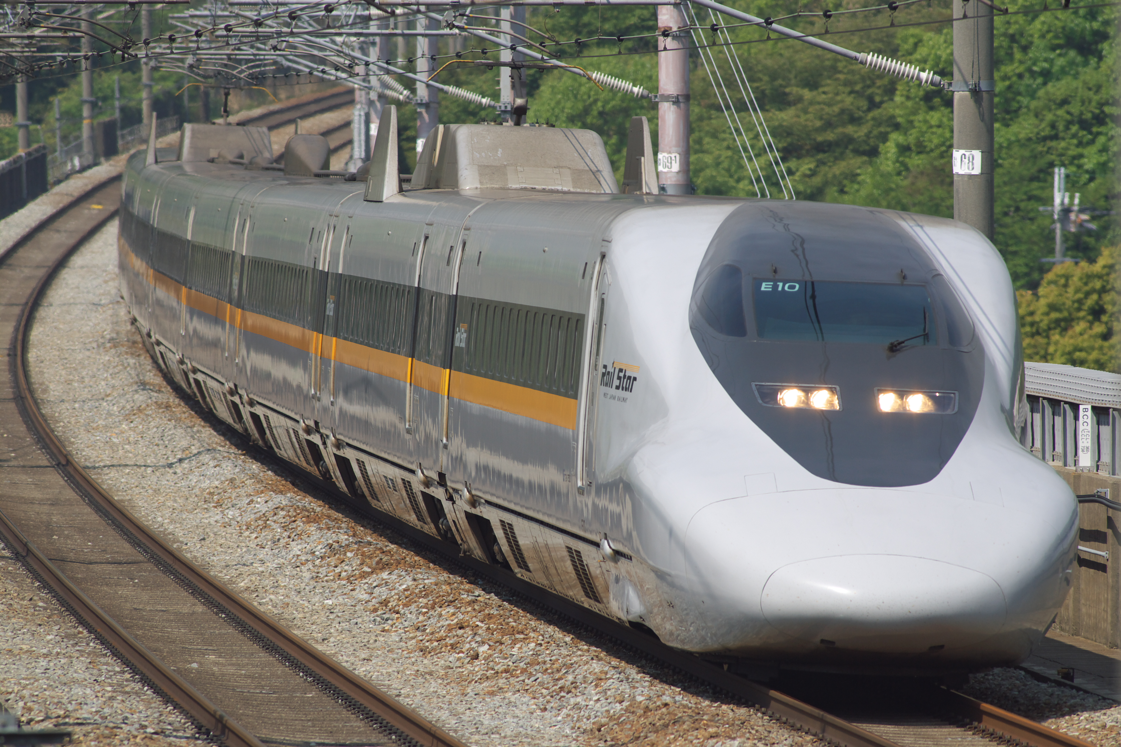 「ひかりレールスター」の運用に就く700系E編成 2008年4月26日 山陽新幹線 相生〜岡山